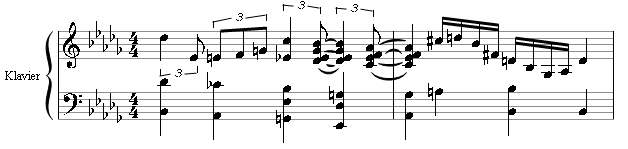 Walking Bass in Tenths in the Stride Piano style of Art Tatums title "Ain`t misbehavin`"